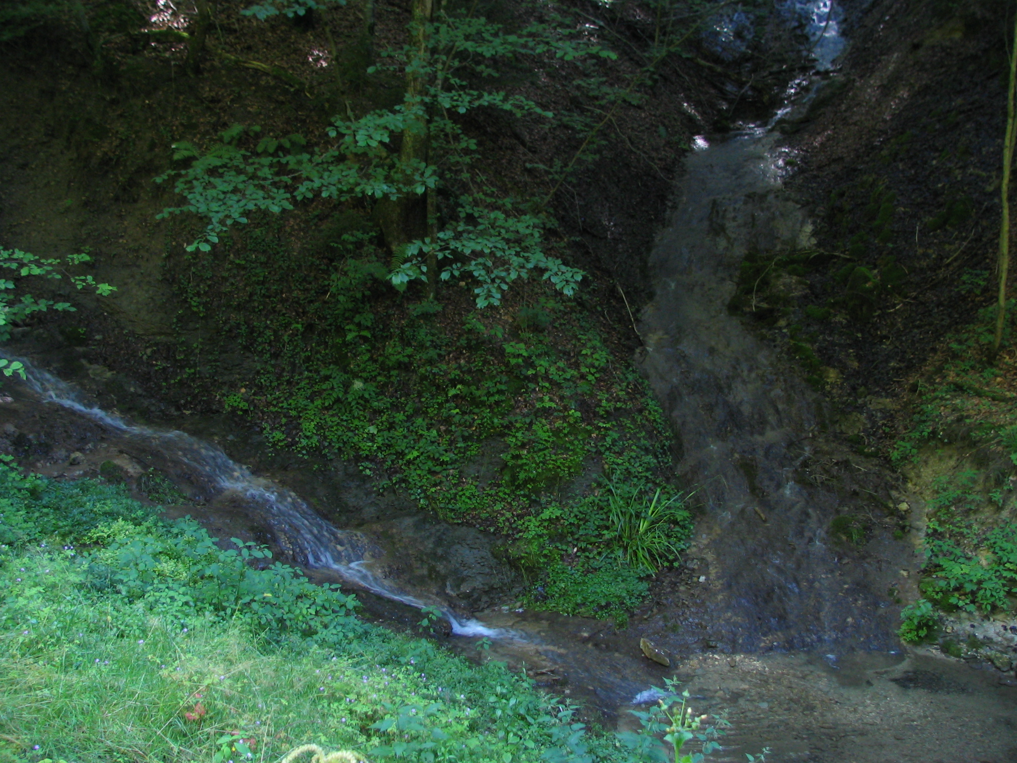 Zwei Arme des Sulgenbachs vereinigen sich im Gummersloch im Köniztal (Kanton Bern, Schweiz)